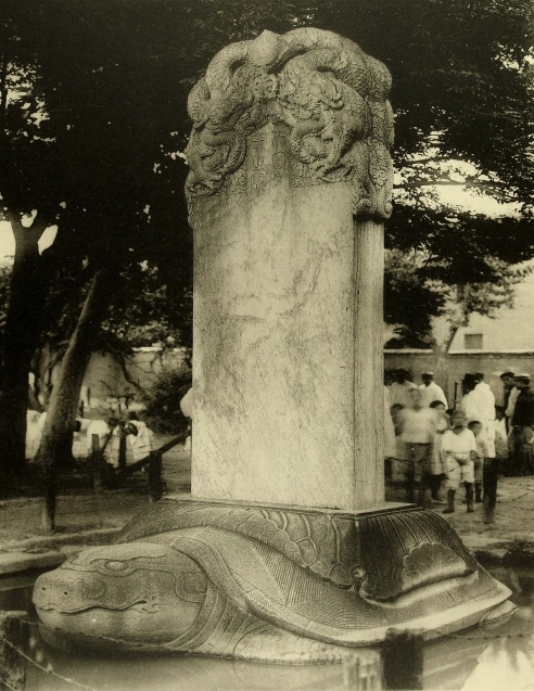 조선고적도보 13권에 수록된 원각사비 모습.